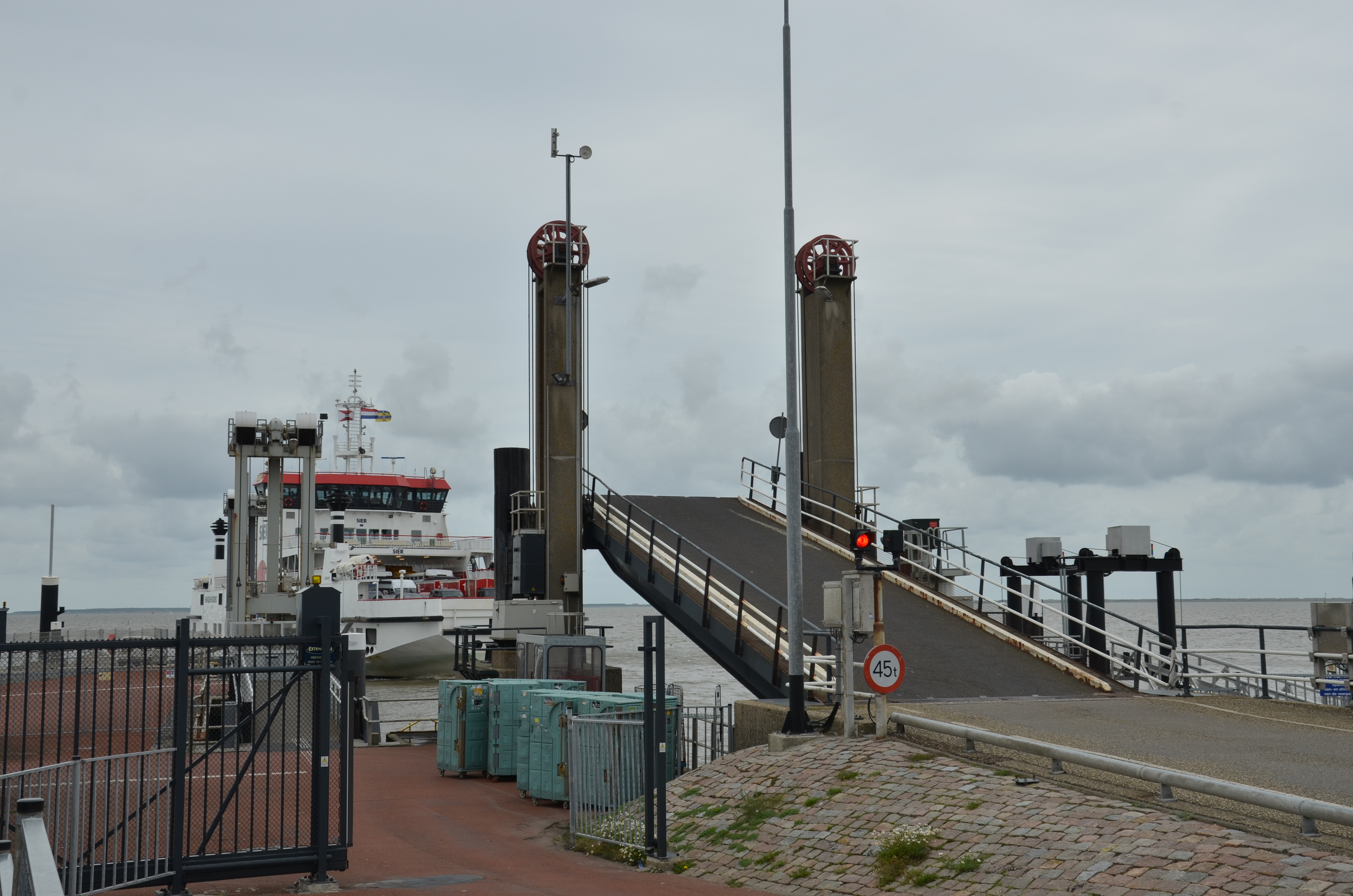 Veerboot de Sier in de haven van Holwerd.